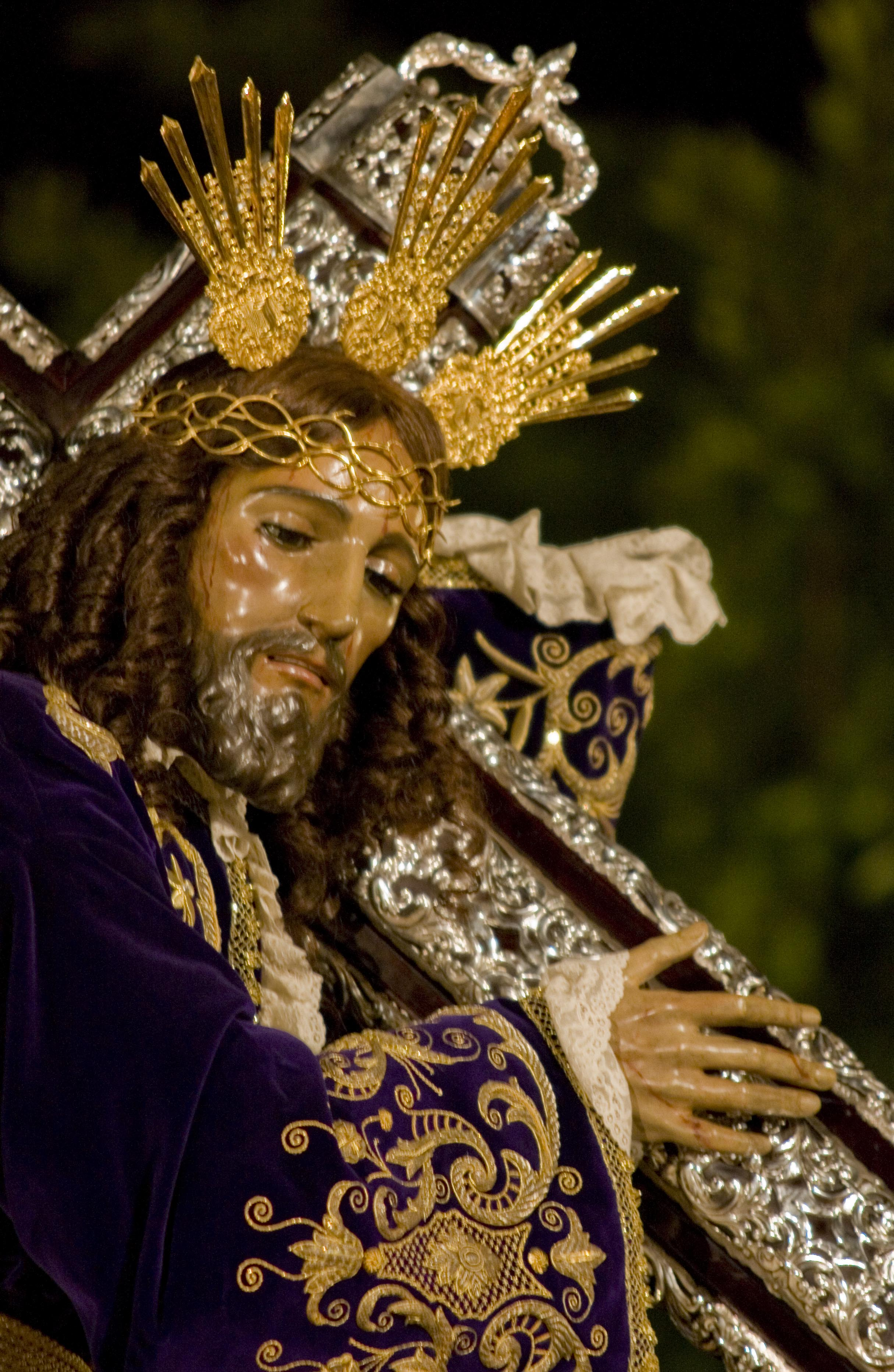 imagen de jesus el rico en procesion